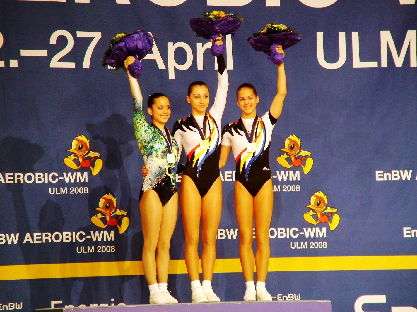 Bucsánszki Linda a dobogón